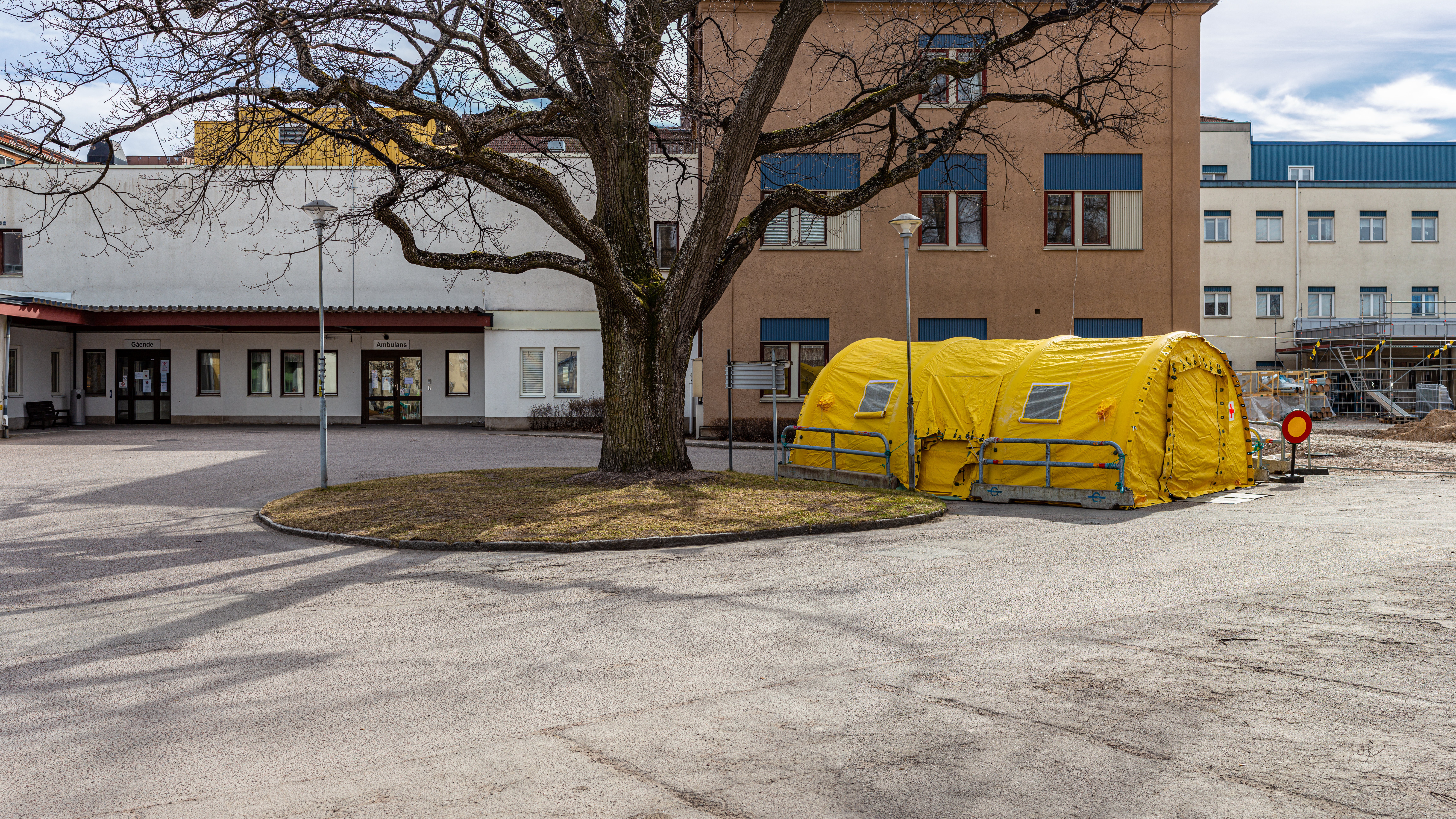 Akutmottagningen samt ett Covid-19-tält på Avesta lasarett, taget i bruk 2020-03-27, där alla inkommande patienter tas emot och testas innan de får komma in på akutmottagningen. Ombyggnad av huvudentrén till höger i bild.